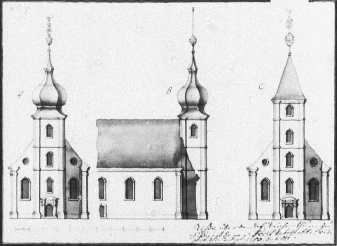 Evangelische Kirche Schriesheim, Entwurf